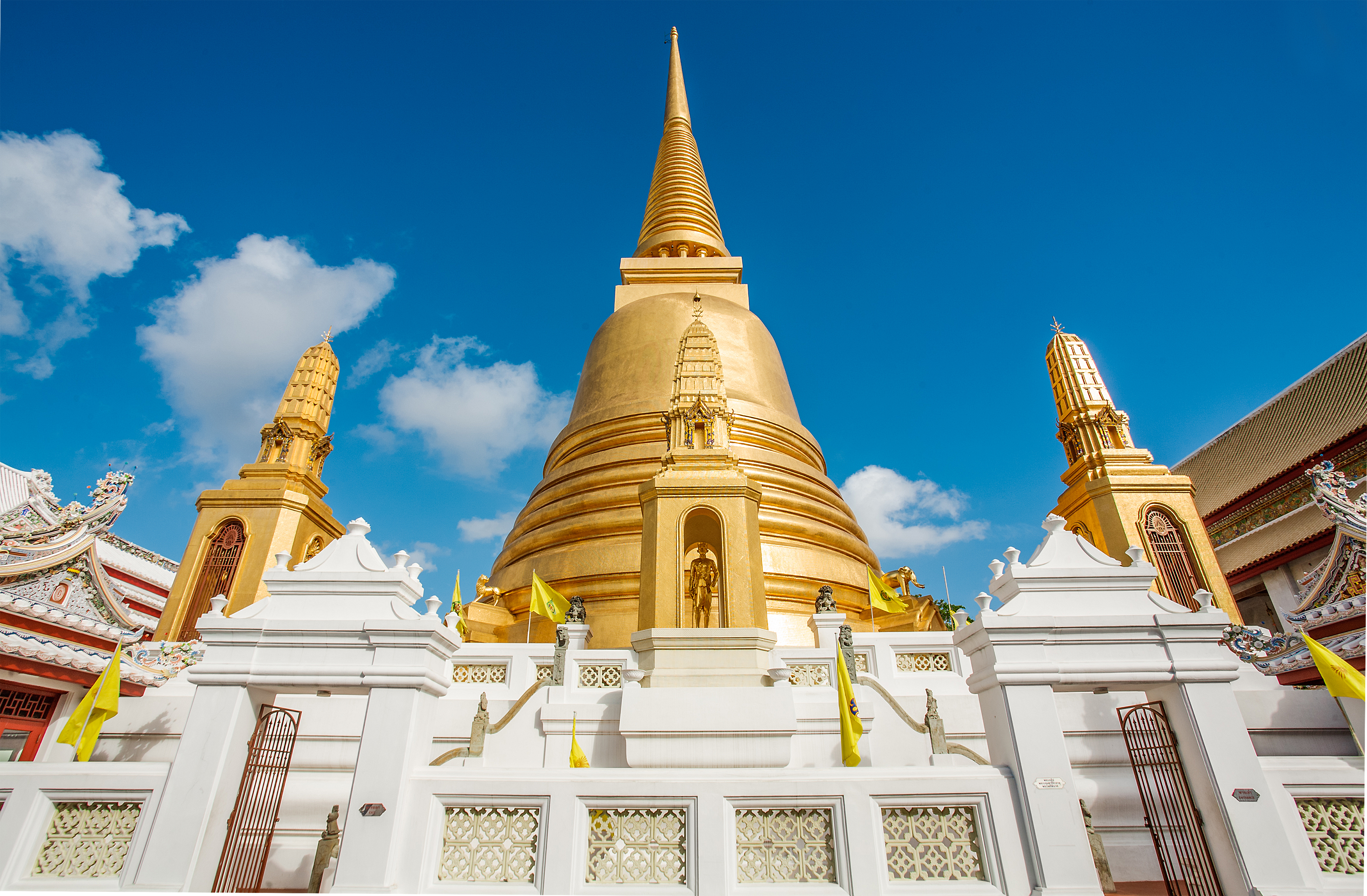 พระเจดีย์ใหญ่ วัดบวรนิเวศวิหารก่อพระฤกษ์เมื่อเดือน ๑๐ ขึ้น ๑๑ ค่ำ ปีเถาะ ตรีศก จ.ศ.๑๑๙๓ (วันเสาร์ที่ ๑๗ กันยายน พุทธศักราช ๒๓๗๔) ในสมัยรัชกาลที่๓ และใช้เวลาก่อสร้างต่อมาจนถึงสมัยรัชกาลที่๔ องค์พระเจดีย์มีสัณฐานกลม มีคูหาภายในเป็นที่ประดิษฐานพระบรมสารีริกธาตุ มีทักษิณ ๒ ชั้นเป็นสี่เหลี่ยม ที่องค์พระเจดีย์มีซุ้มเป็นทางเข้าสู่คูหา ๔ ซุ้ม กลางคูหาพระเจดีย์ประดิษฐานพระเจดีย์กาไหล่ทองบรรจุพระบรมสารีริกธาตุ และมีพระเจดีย์องค์ประดิษฐานอยู่โดยรอบพระเจดีย์กาไหล่ทองอีก ๔ องค์ คือ ด้านตะวันตก พระไพรีพินาศเจดีย์ ด้านใต้ พระเจดีย์บรมราชานุสรณ์พระชนมพรรษา ๕ รอบ พระบาทสมเด็จพระเจ้าอยู่หัว ภูมิพลอดุลยเดช ด้านตะวันออก เป็นพระเจดีย์ไม้ปิดทอง ไม่ปรากฏประวัติ ด้านตะวันตก พระเจดีย์โลหะปิดทอง ไม่ปรากฏประวัติ